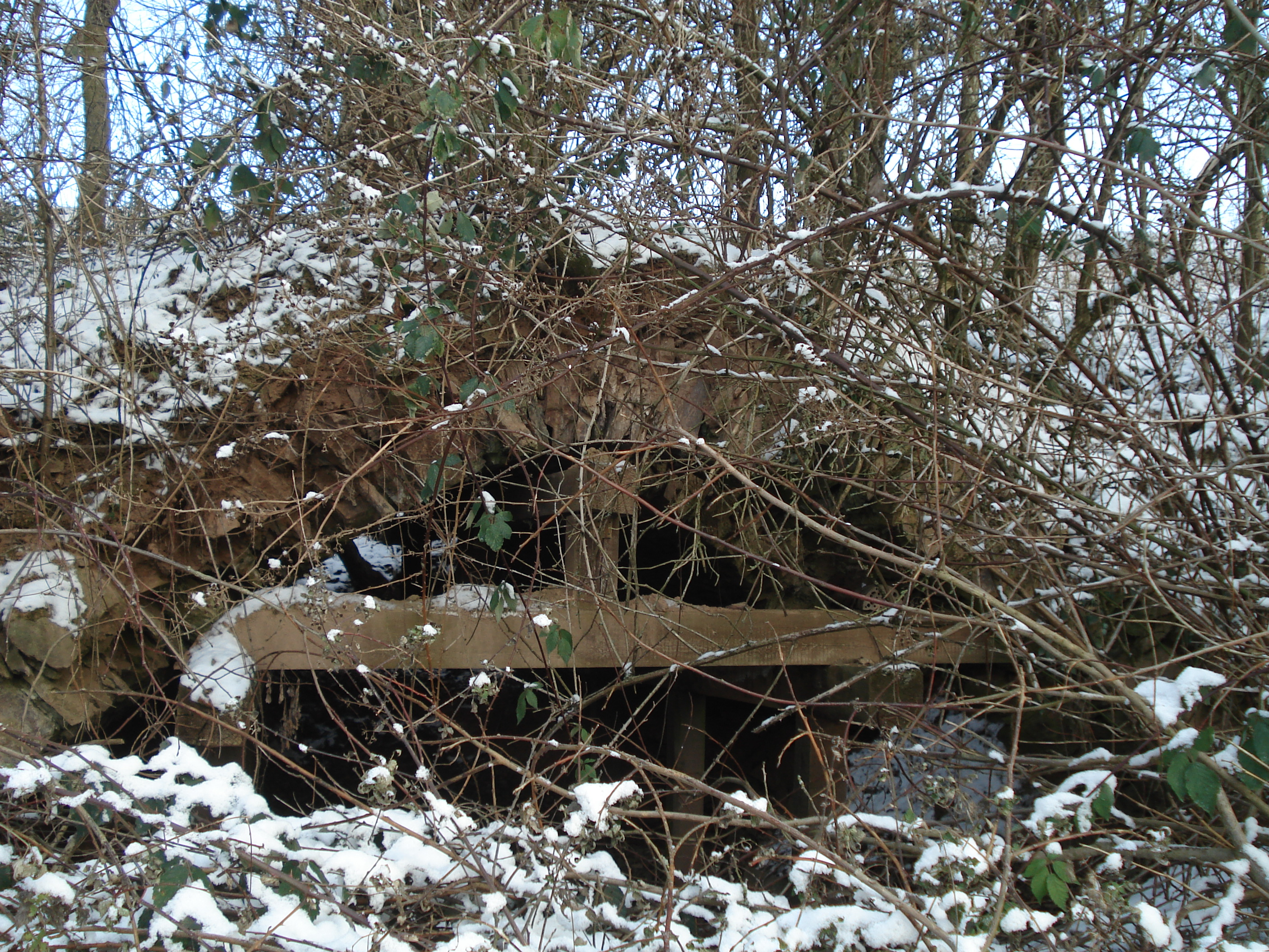 Das zerfallene Kellergewölbe des Hüttenberger Hofes bei Mömbris von vorne